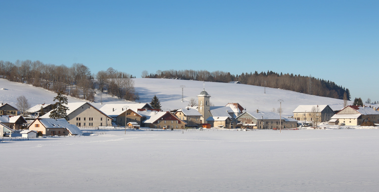 Le village du Barboux